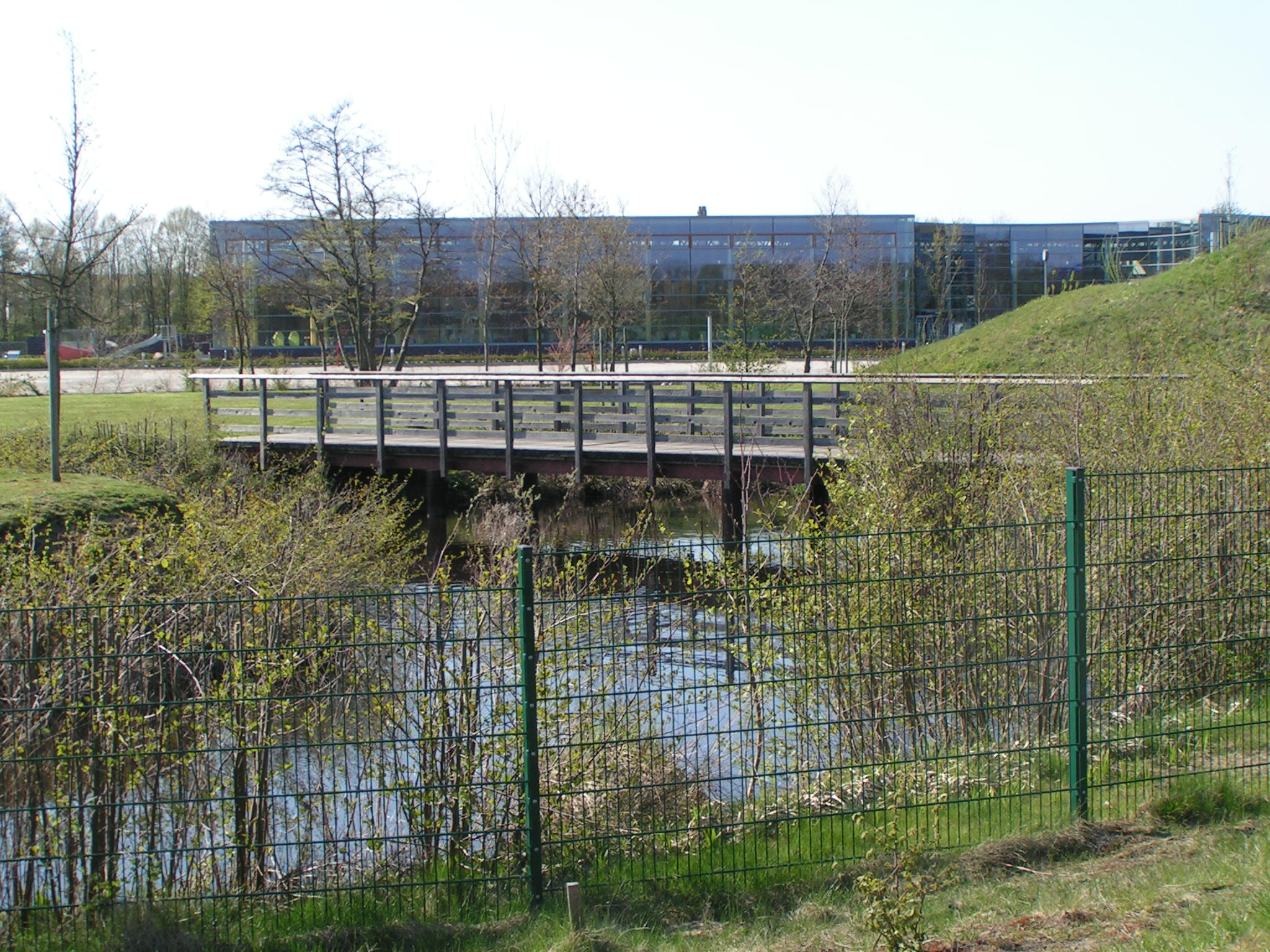 Renaturierte Mühlenhunte in Oldenburg beim Huntebad